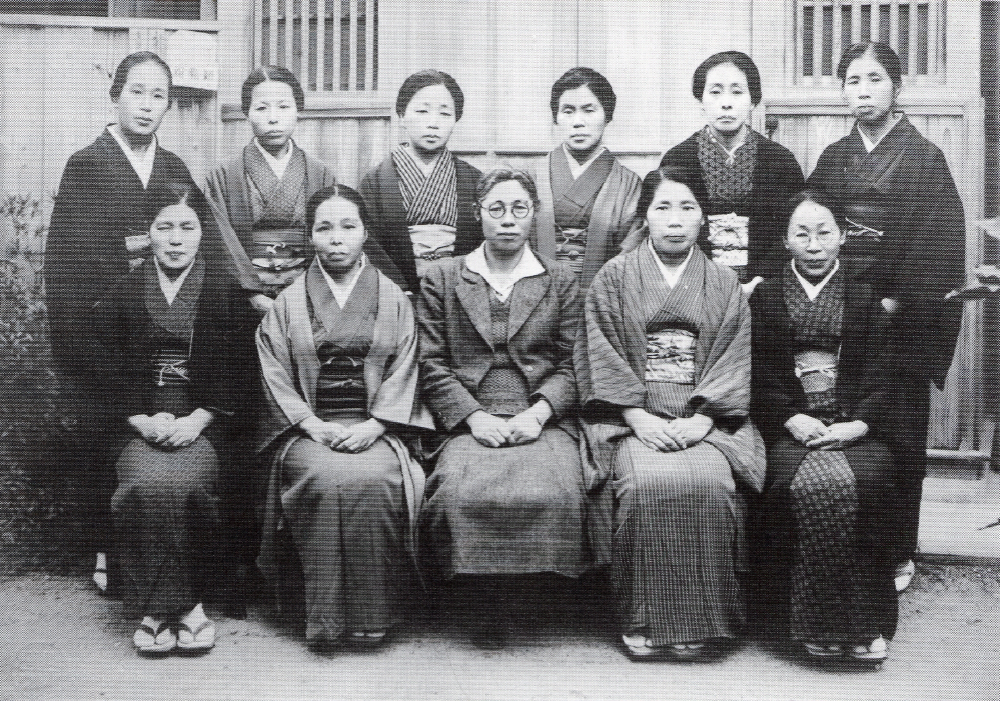 市川房枝と、愛知県第二師範学校女子部また愛知県女子師範学校の同窓生。1941年。